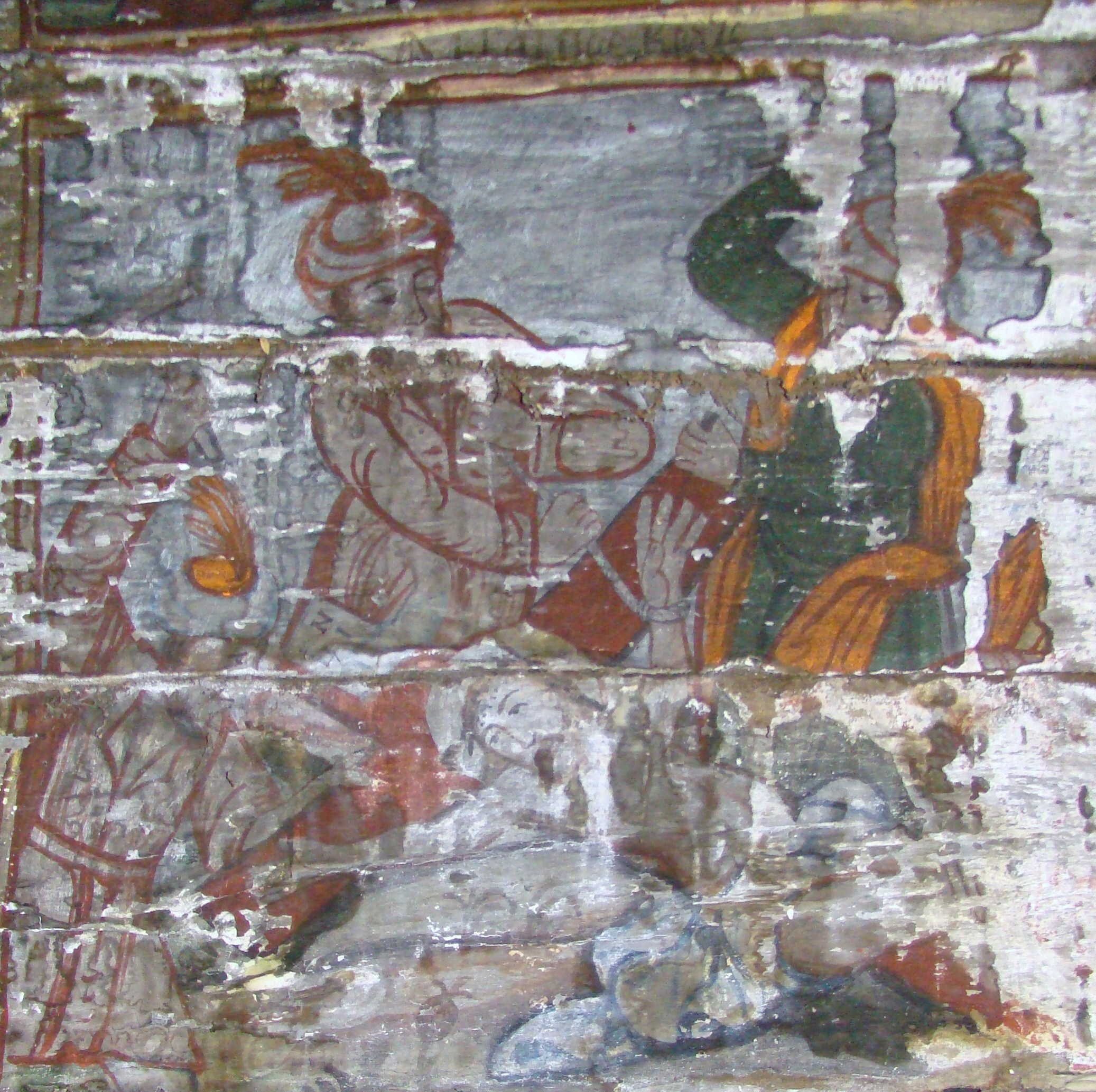 Biserica Sfinţii Arhangheli, Sat Brusturi, Comuna Creaca, județul Sălaj